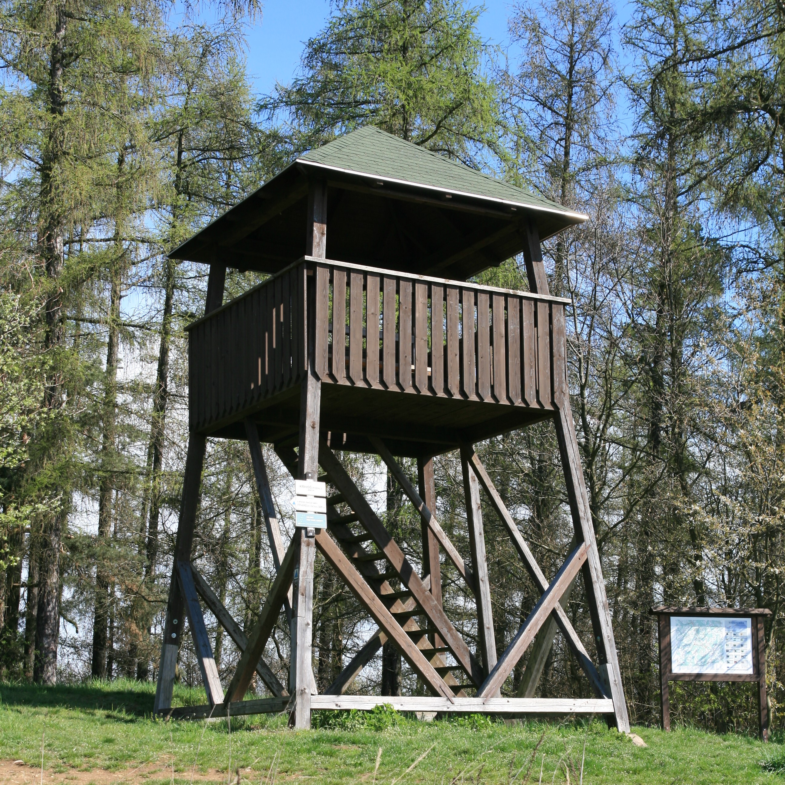 Rozhledna Křivoš u obce Kaly, okres Brno-venkov.